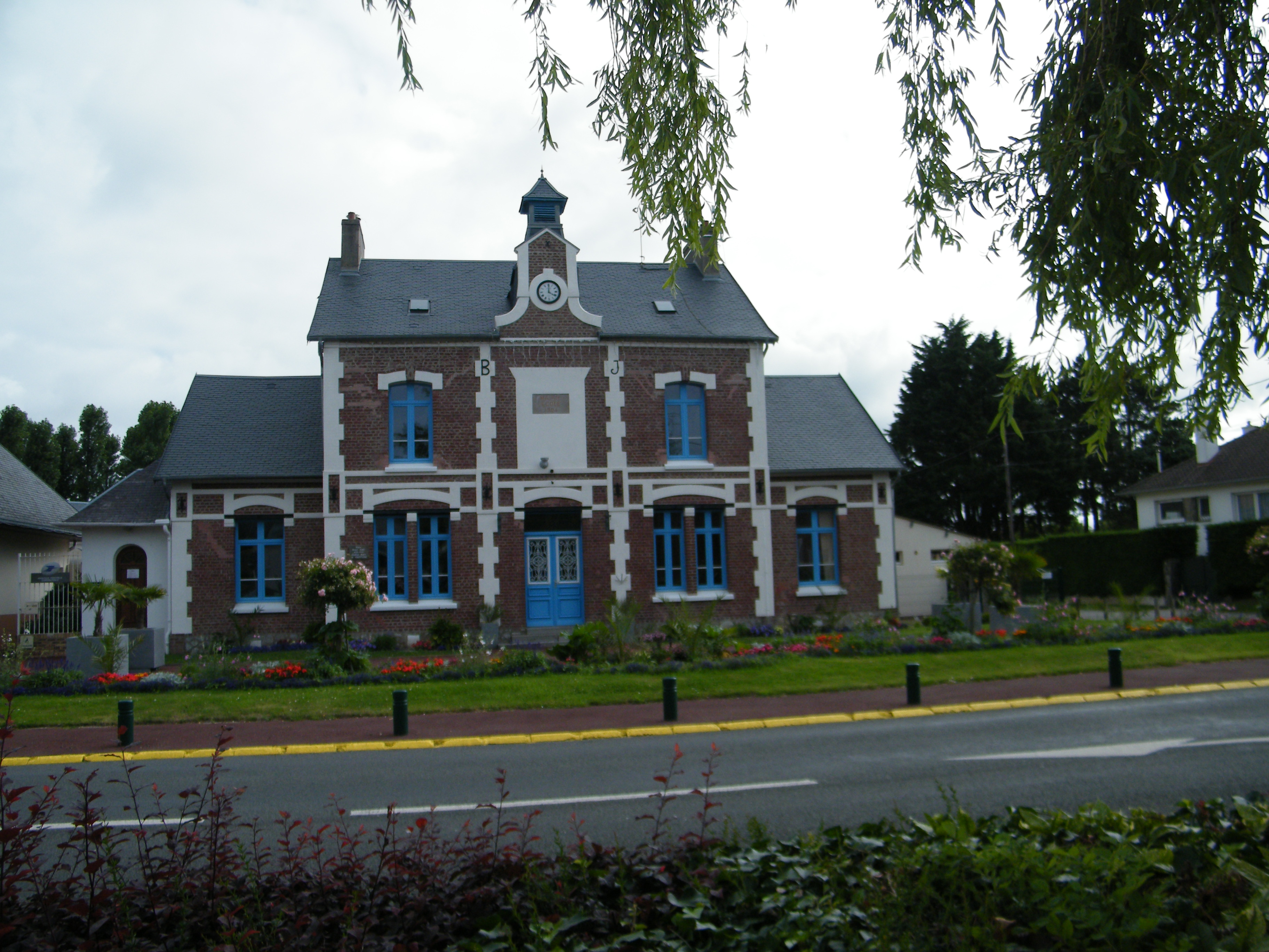 Mairie-école de 1904, Groffliers, Pas-de-Calais, France (3)